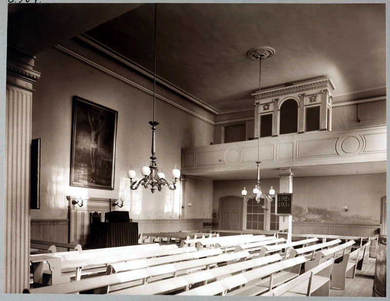 The old Moravian Church at Kungsträdgårdsgatan 12 in Stockholm. The church was in a back building, and does not exist any more. Herrnhutarnas (Evangeliska Brödraförsamlingens) gamla kyrka i Stockholm, i ett gårdshus på Kungsträdgårdsgatan 12. Kyrkan finns inte längre kvar.